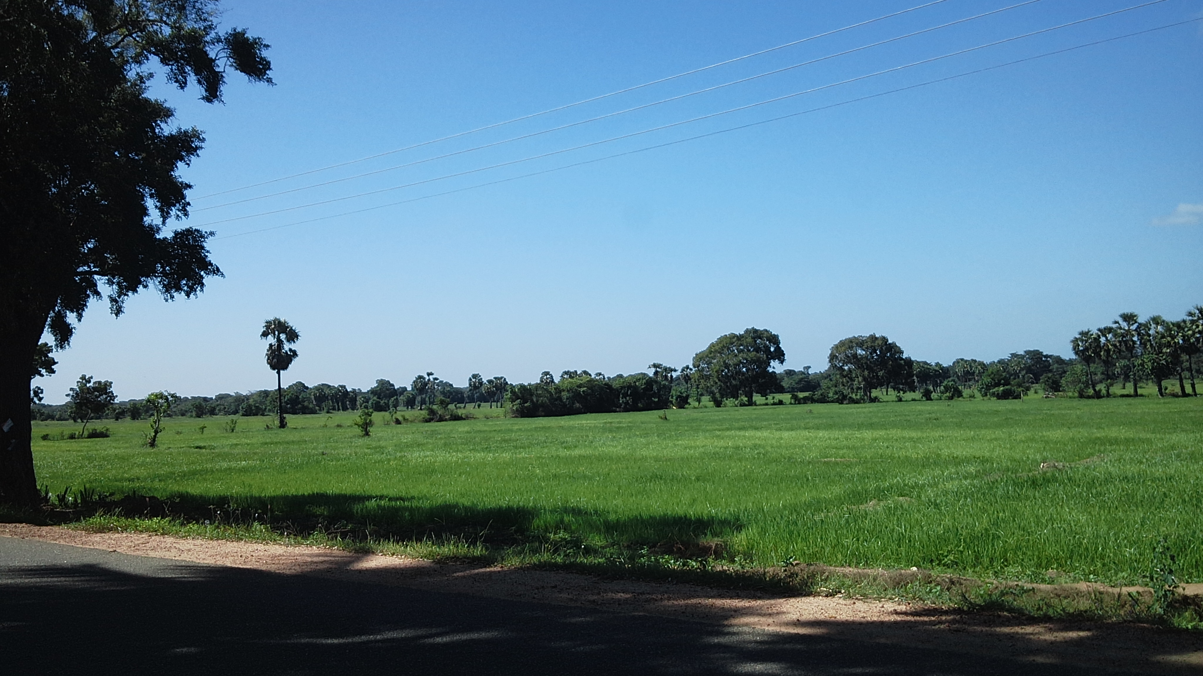 வட்டக்கச்சிக்கு அழகு தரும் வயற்காட்சி